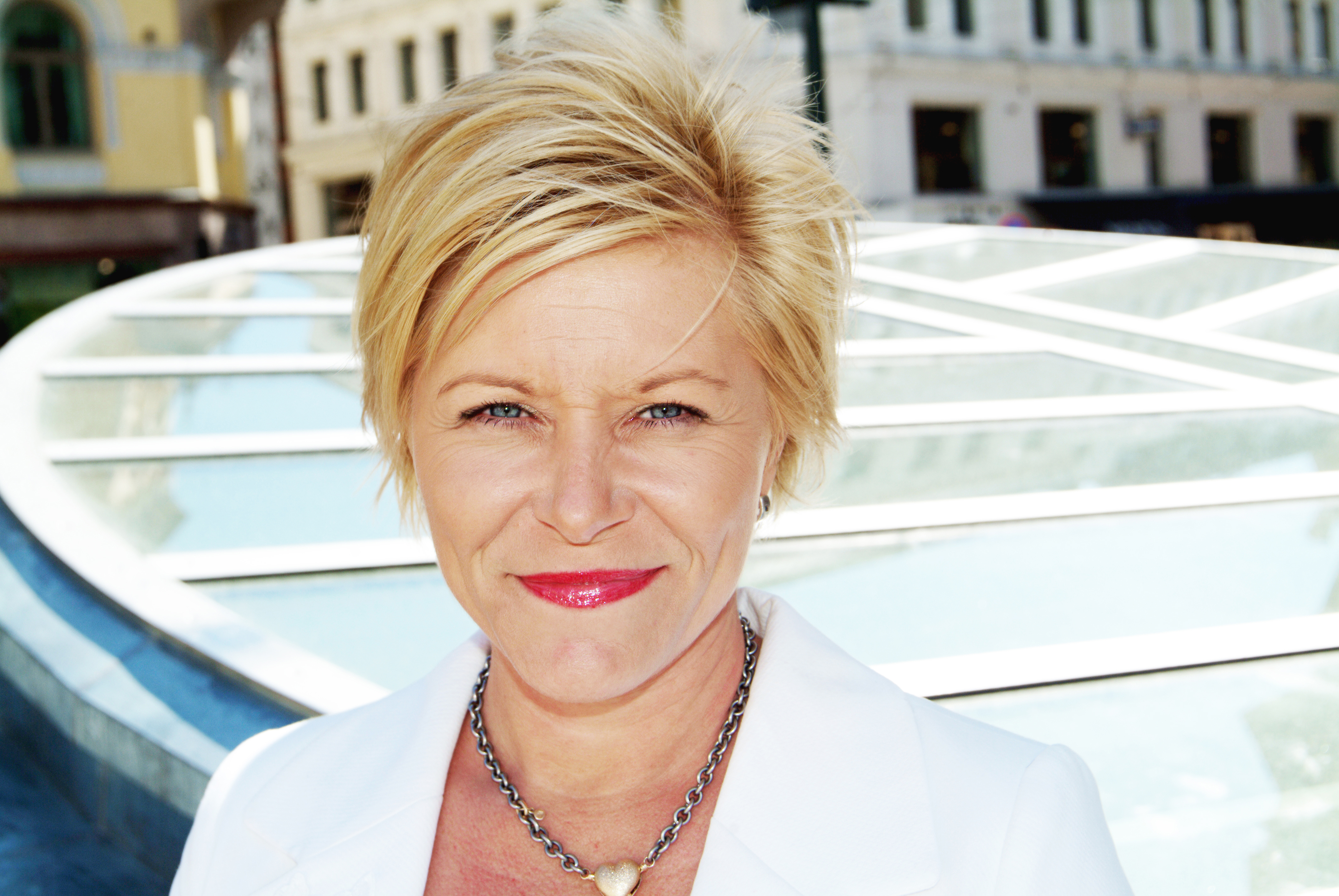 Siv Jensen, FrP-politiker